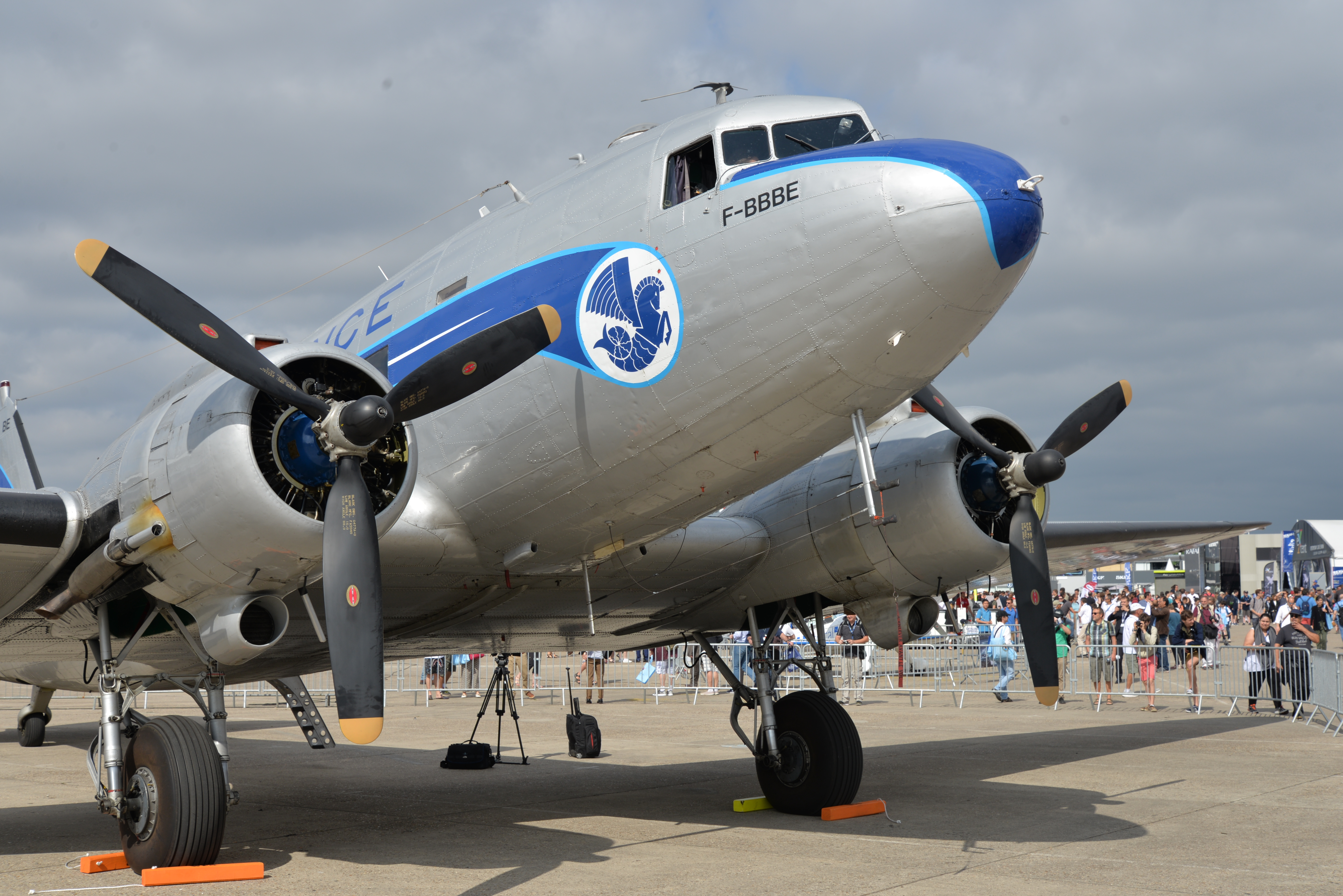 Douglas DC-3 Paris Air Show 2017